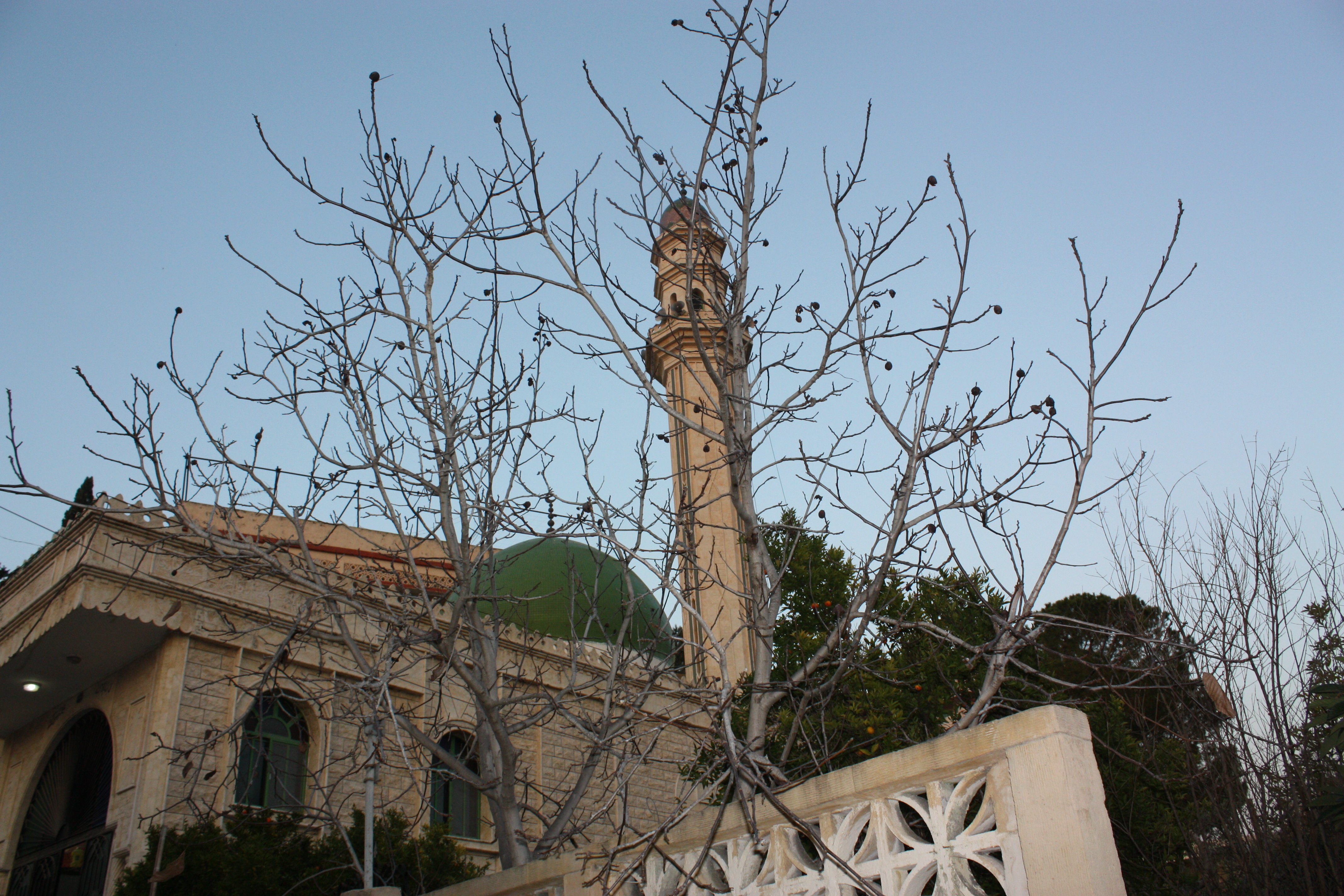 Kfar Beit, Lebanon